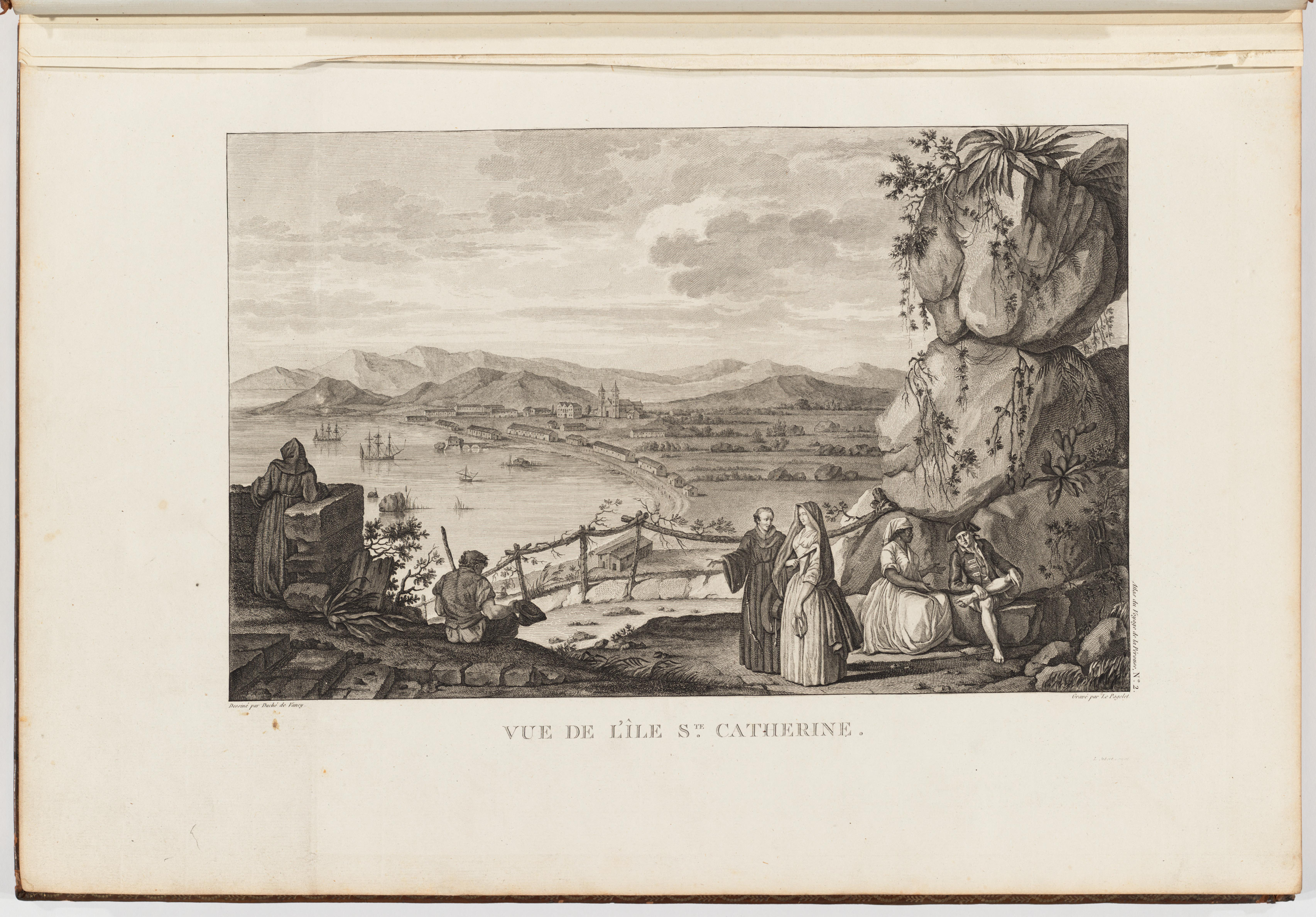 Vue de l'île Sainte-Catherine (Santa Catarina, Brésil). Voyage de La Pérouse autour du monde /publié conformément au décret du 22 avril 1791, et rédigé par L.A. Milet-Mureau.